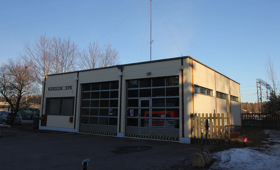 Korson VPK:n (vapaapalokunnan) rakennus Vantaan Korson kaupunginosassa.